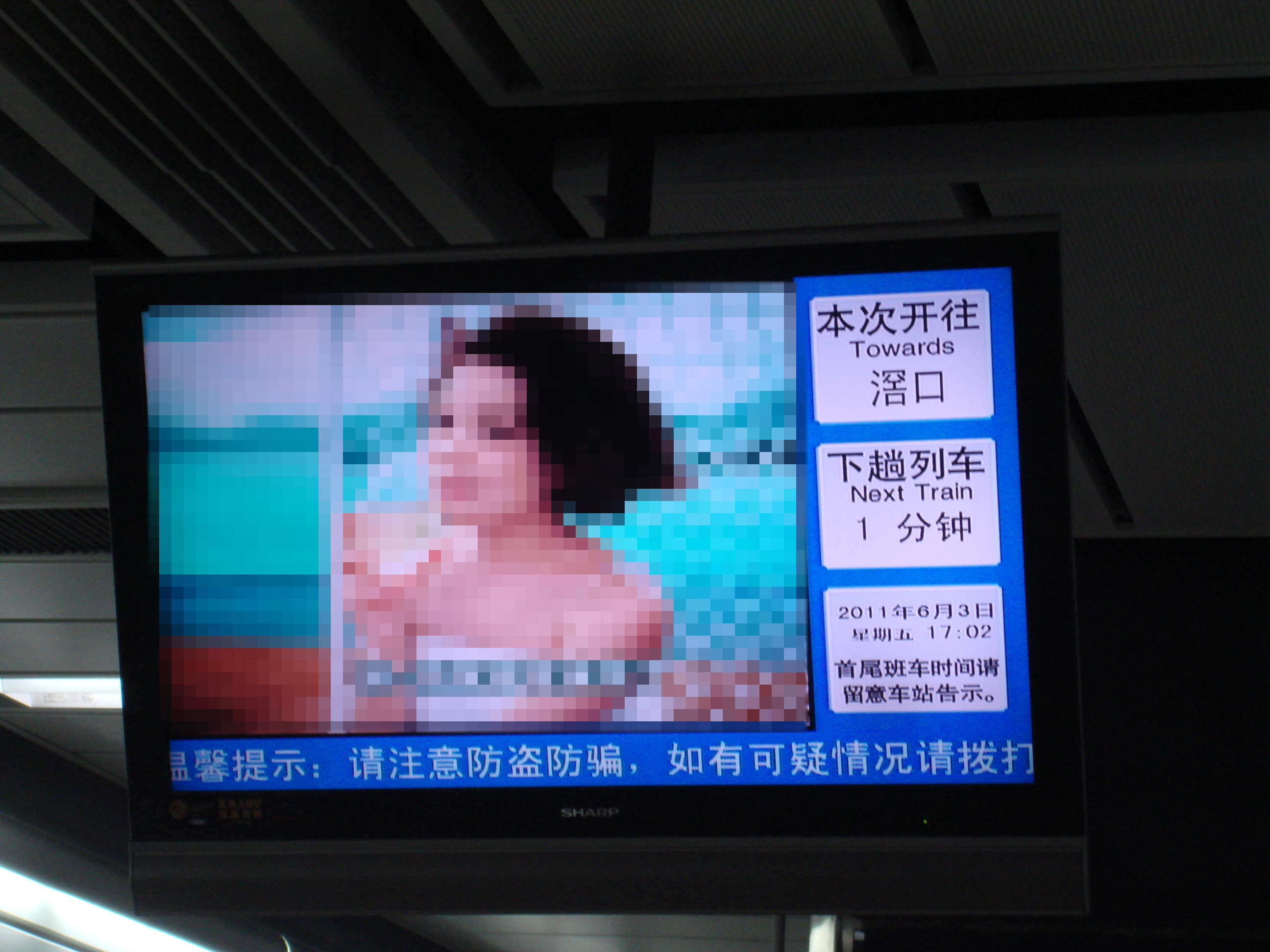 廣州地鐵候車電視熒光幕（乘客信息導乘服務系統，Passenger Information Display System, PIDS）。候車提示中的「目的地」、「分鐘」均沒有英文提供，翻譯不完整。